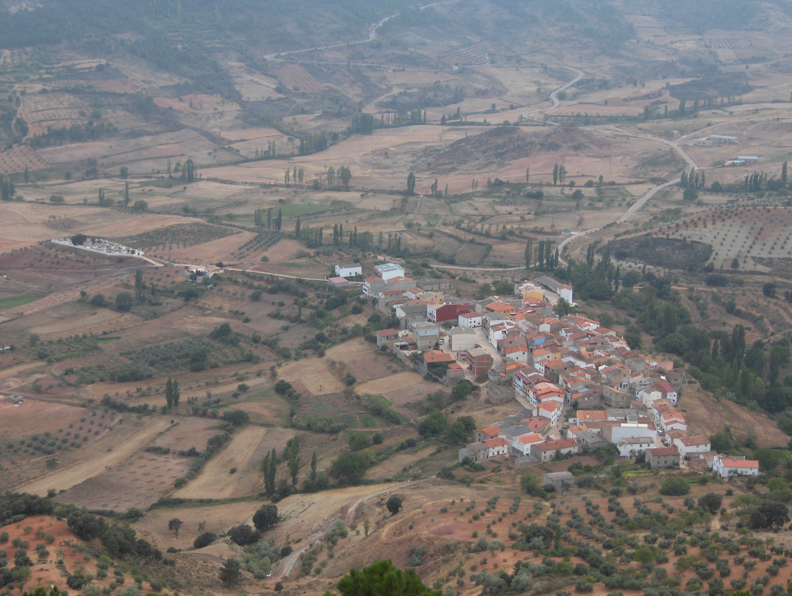 Fotografía de una panorámica de la localidad de La Vegallera dentro del municipio de Molinicos (Albacete)